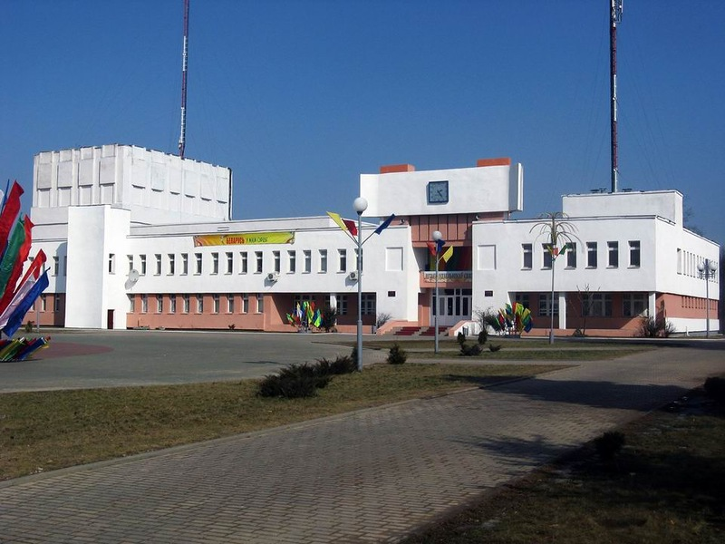 Марьина Горка. Дом культуры